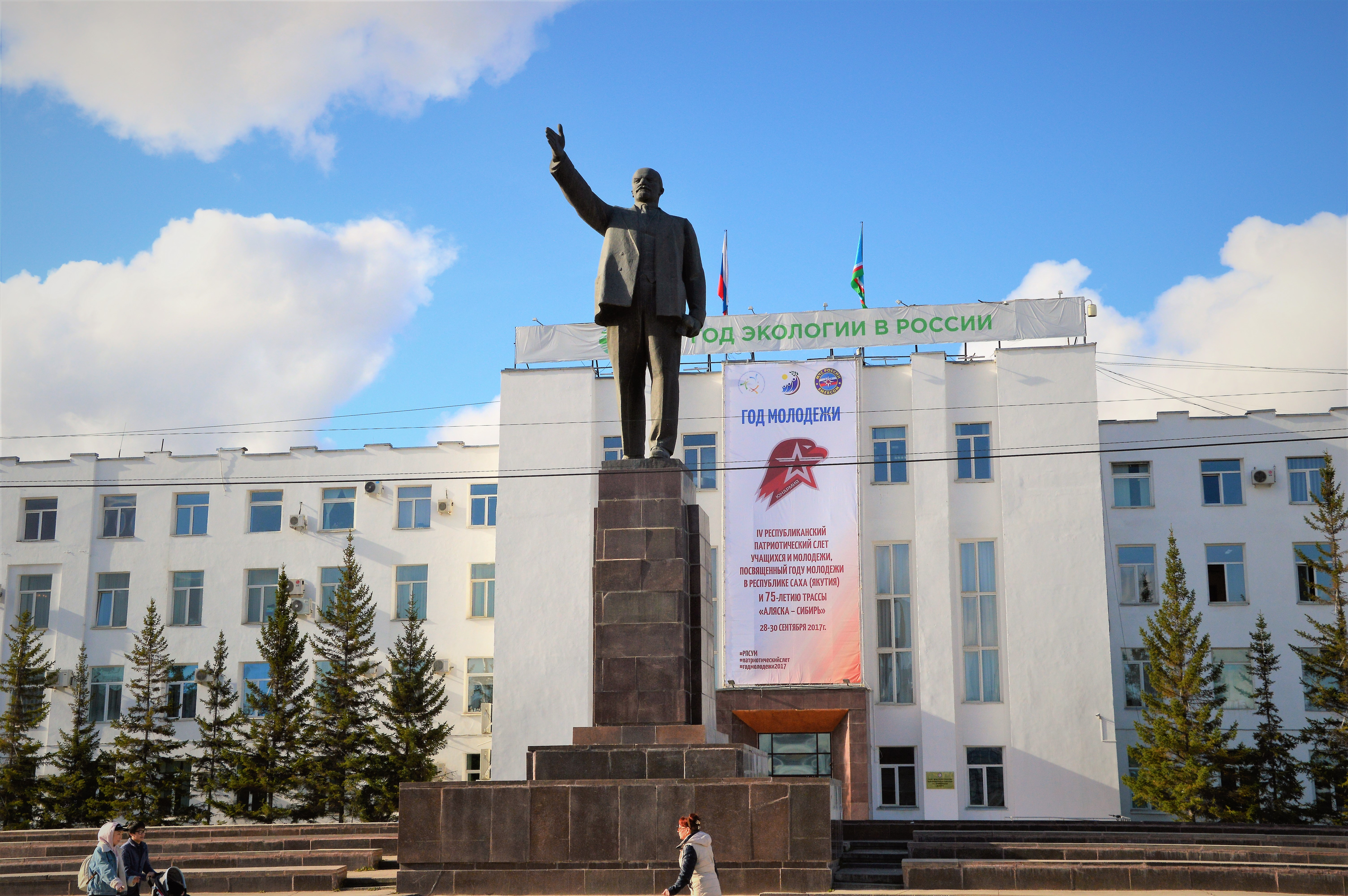 Памятник Ленину В.И.: площадь Ленина, Якутск, Якутия (Саха)